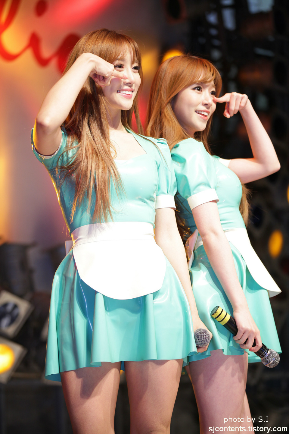 코코소리(COCOSORI) 신인발굴프로젝트 동대문 밀리오레